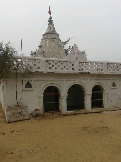 ककरहानाथ मंदिर